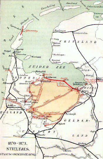 Plan Stieltjes. Auteursrecht verlopen. Herkomst